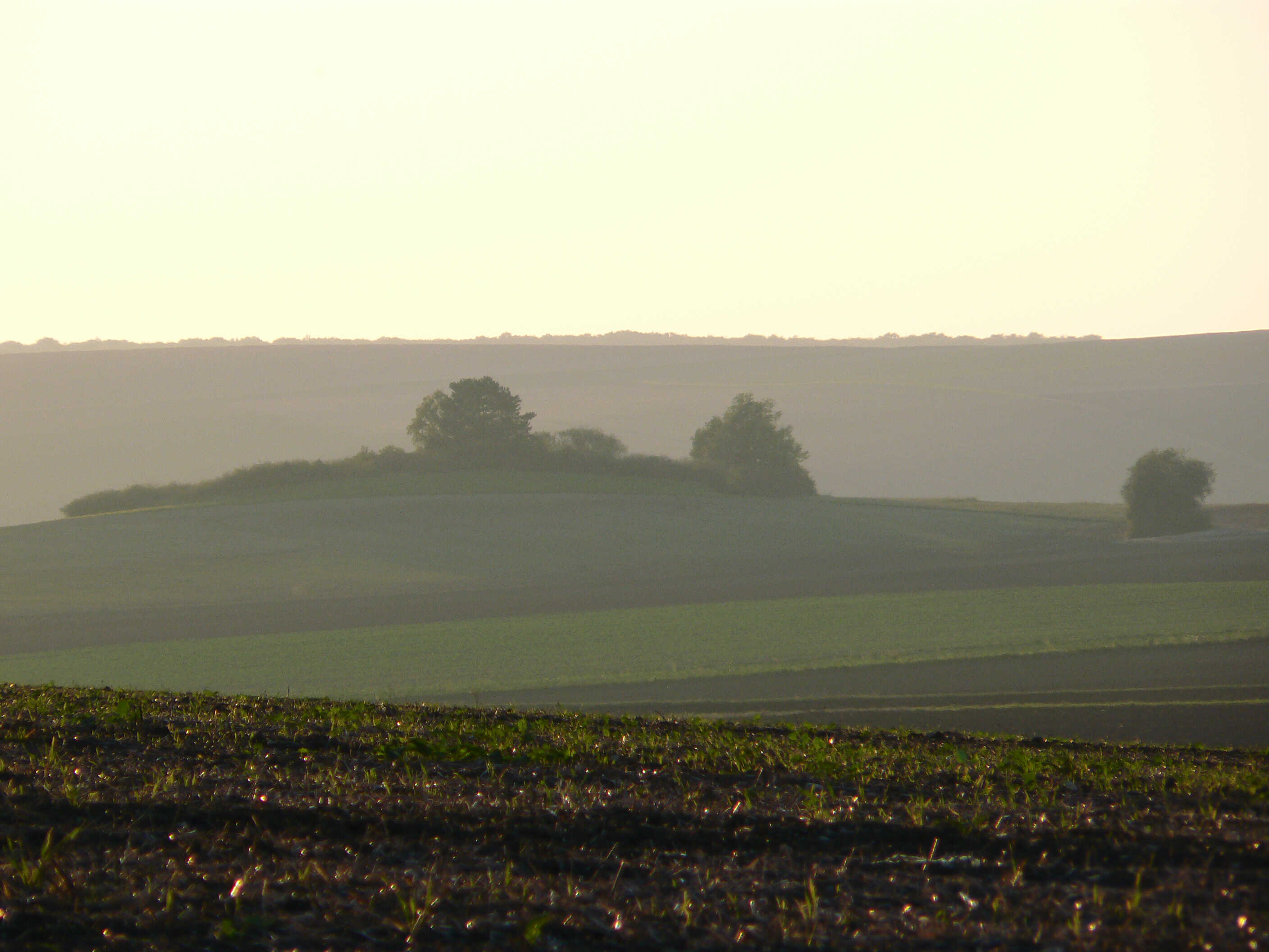 Vue d'une butte sur le Plateau de Mont sur Courville